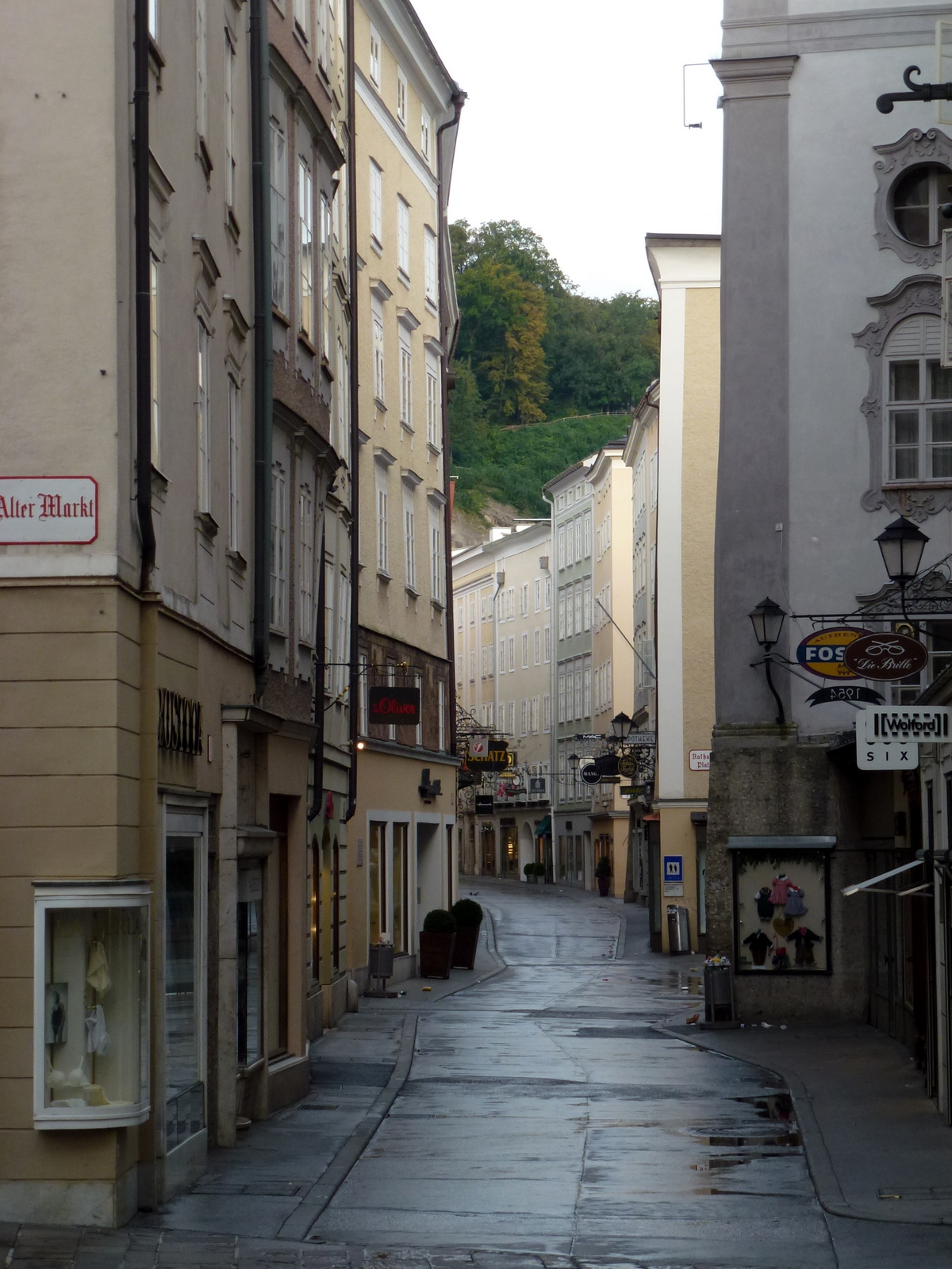 Blick vom Alten Markt auf den Kranzlmarkt